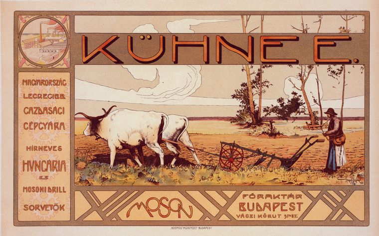 Affiche signée Árpád Basch pour la Maison Kühnee - la plus ancienne maison de construction de machines agricoles de Hongrie. Fabricant des célèbres marques Hungaria et Moson. [Dimensions of the original] 0m,41 x 0m,69.